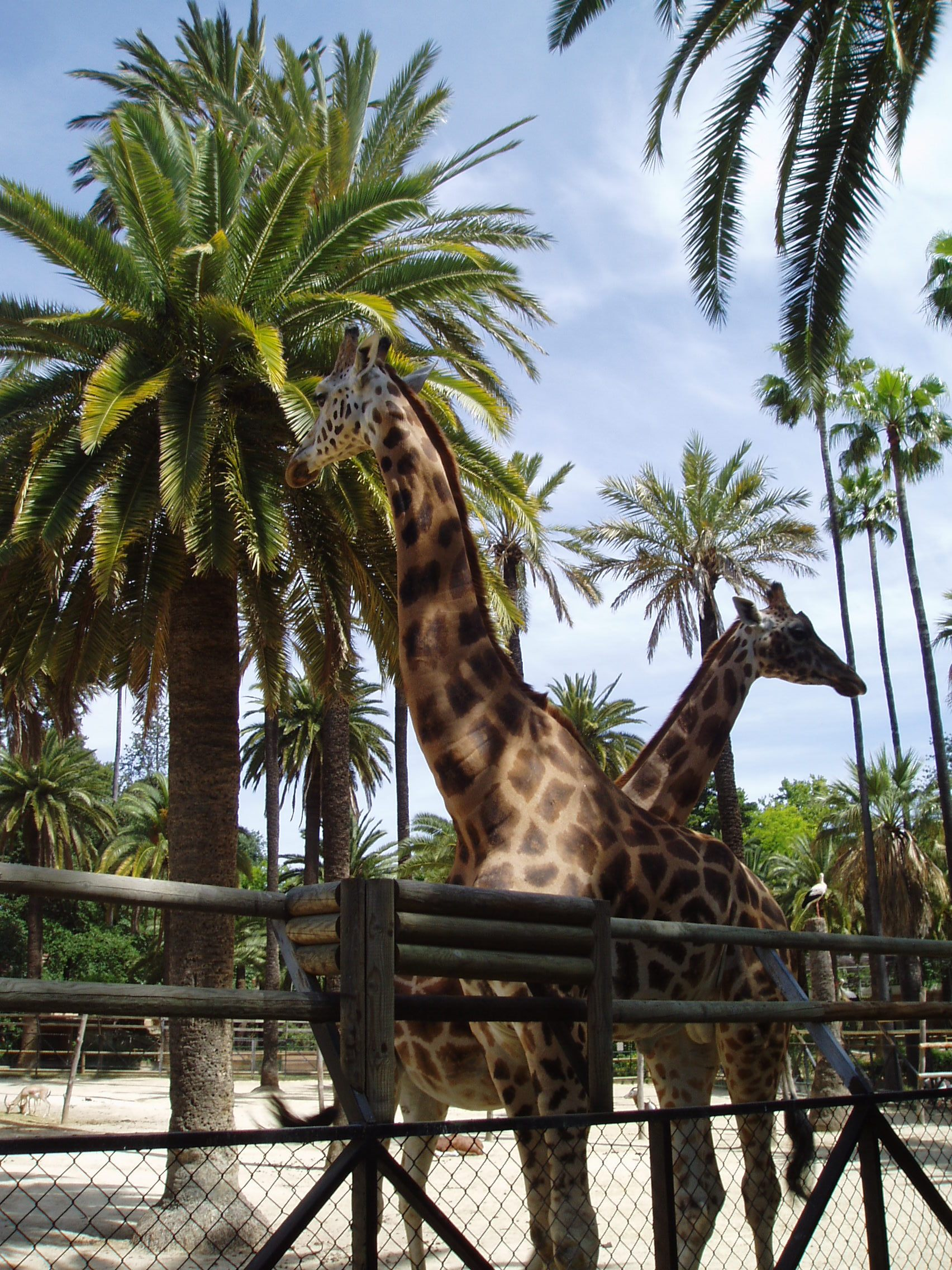 Jirafas en el zoo de Jerez de la Frontera, Andalucía, España.